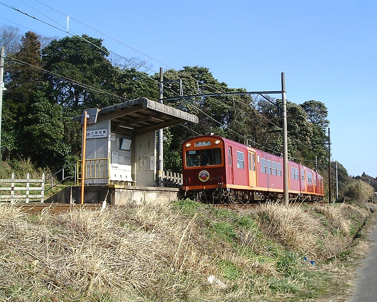 近鉄北勢線上笠田駅（三岐鉄道へ譲渡の後廃駅） 下り列車が到着